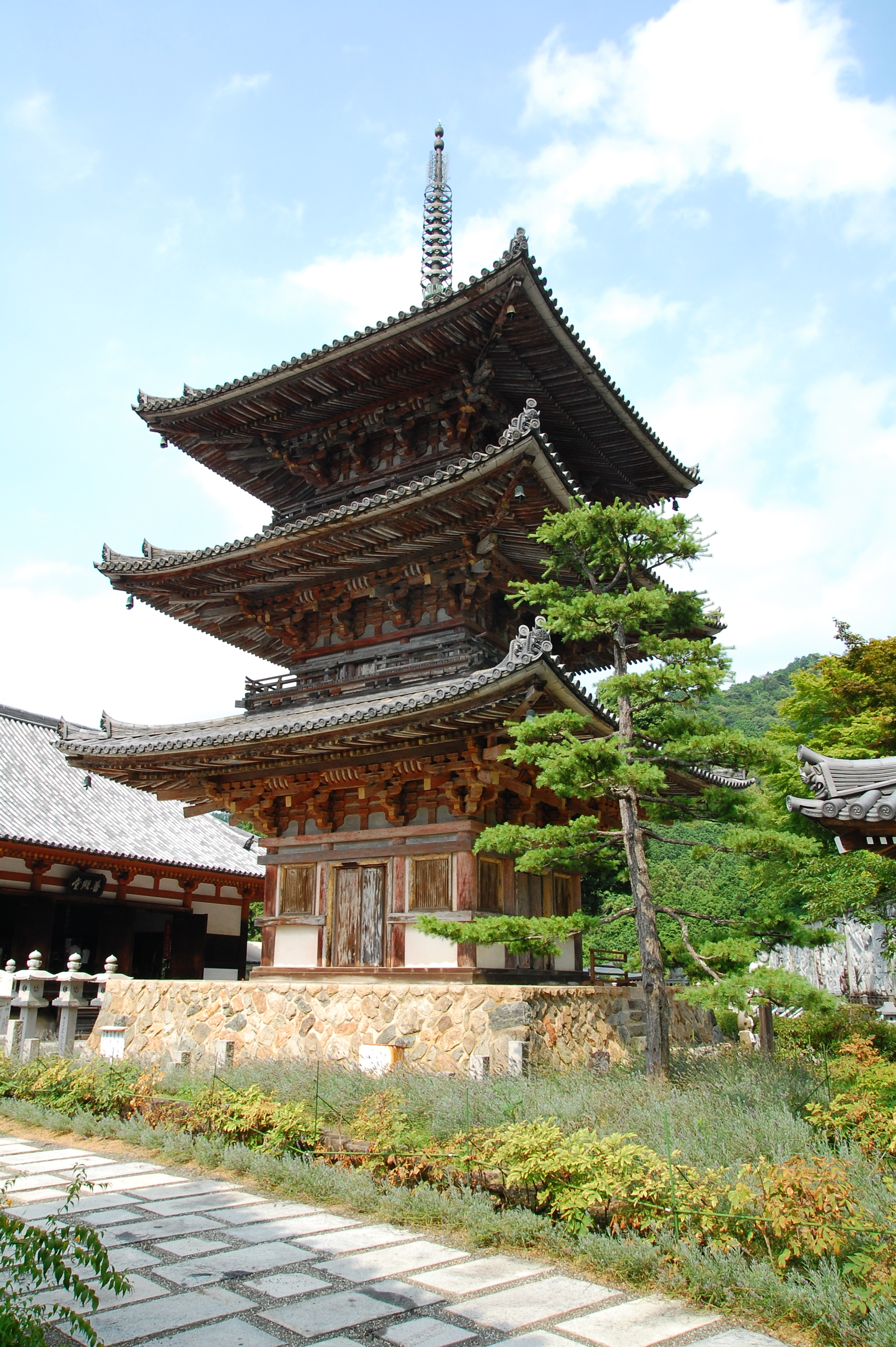 奈良県高市郡高取町南法華寺(壺阪寺)